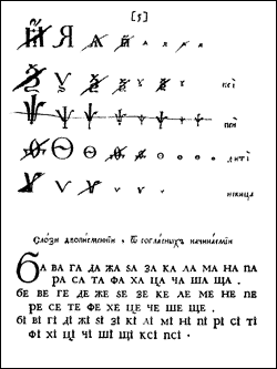 Гражданская азбука с исправлениями Петра I. (Civil Russian alphabet with marks by Peter I.) Page 5.